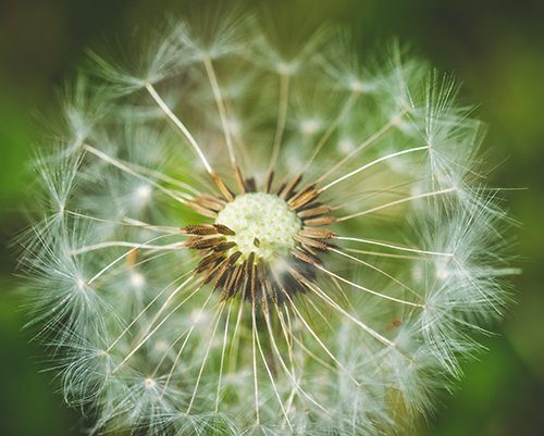 Fotografija belog maslačka.